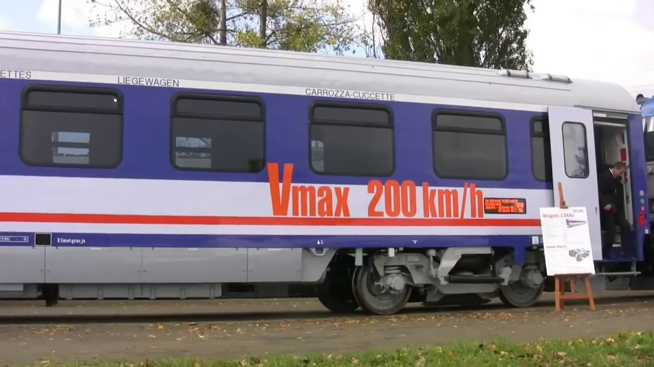 Kuszetka typu 134Ac prezentowana podczas targów Trako 2011 w Gdańsku.